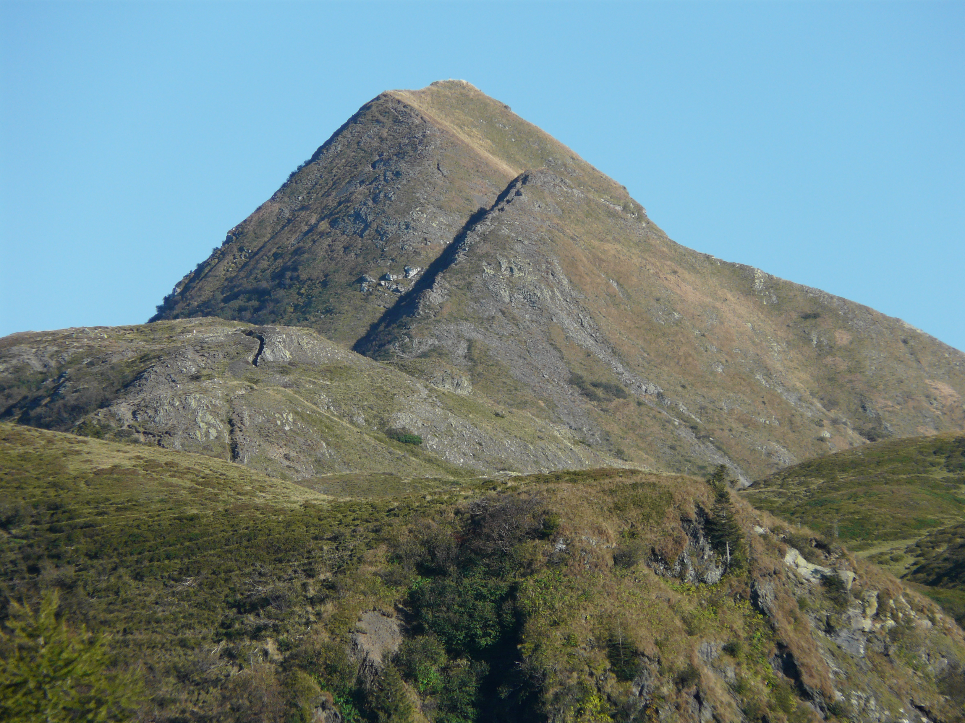 Der Findenigkofel, ein 2016 Meter hoher Berg in den Karnischen Alpen.